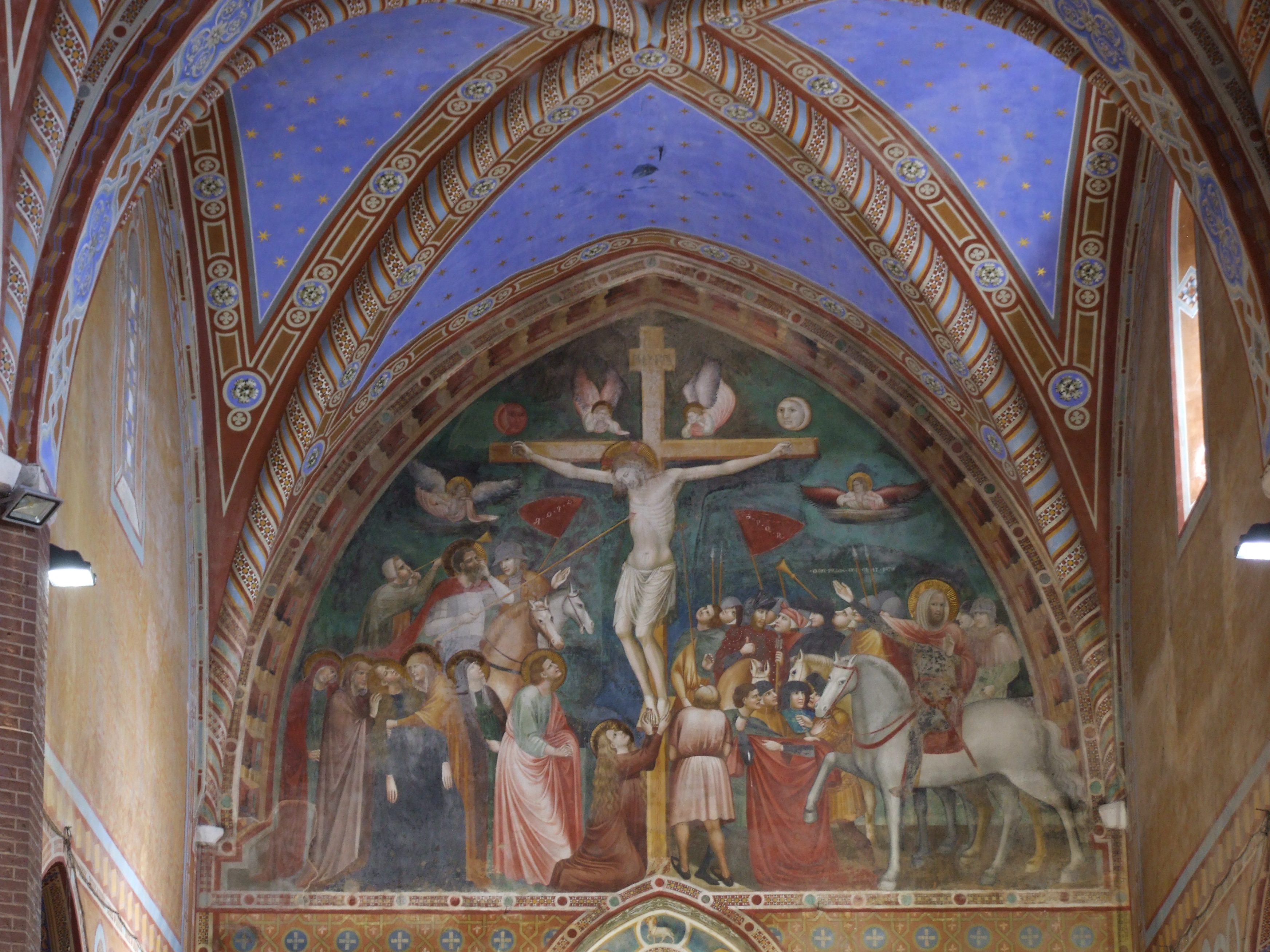 Chiesa di San Marco - Crocifissione (affresco, sec. XIV) This is a photo of a monument which is part of cultural heritage of Italy.